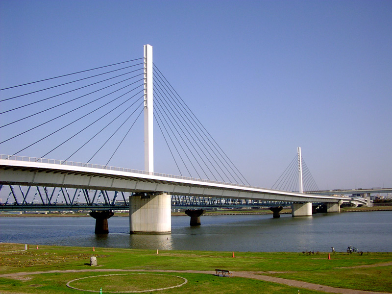 平行して走るのは東京地下鉄東西線、江戸川区側で首都高速中央環状線の下をくぐる。また構造体に清新町出入口を含む。 撮影位置 荒川にかかる清砂大橋を、江東区側から撮影した。 撮影日 2004年3月18日 撮影者 jmho（投稿者と同じ） 撮影機材 東芝製デジタルカメラ sora T10 画像形式 JPEG形式 横800×縦600ピクセル。色数24bit。